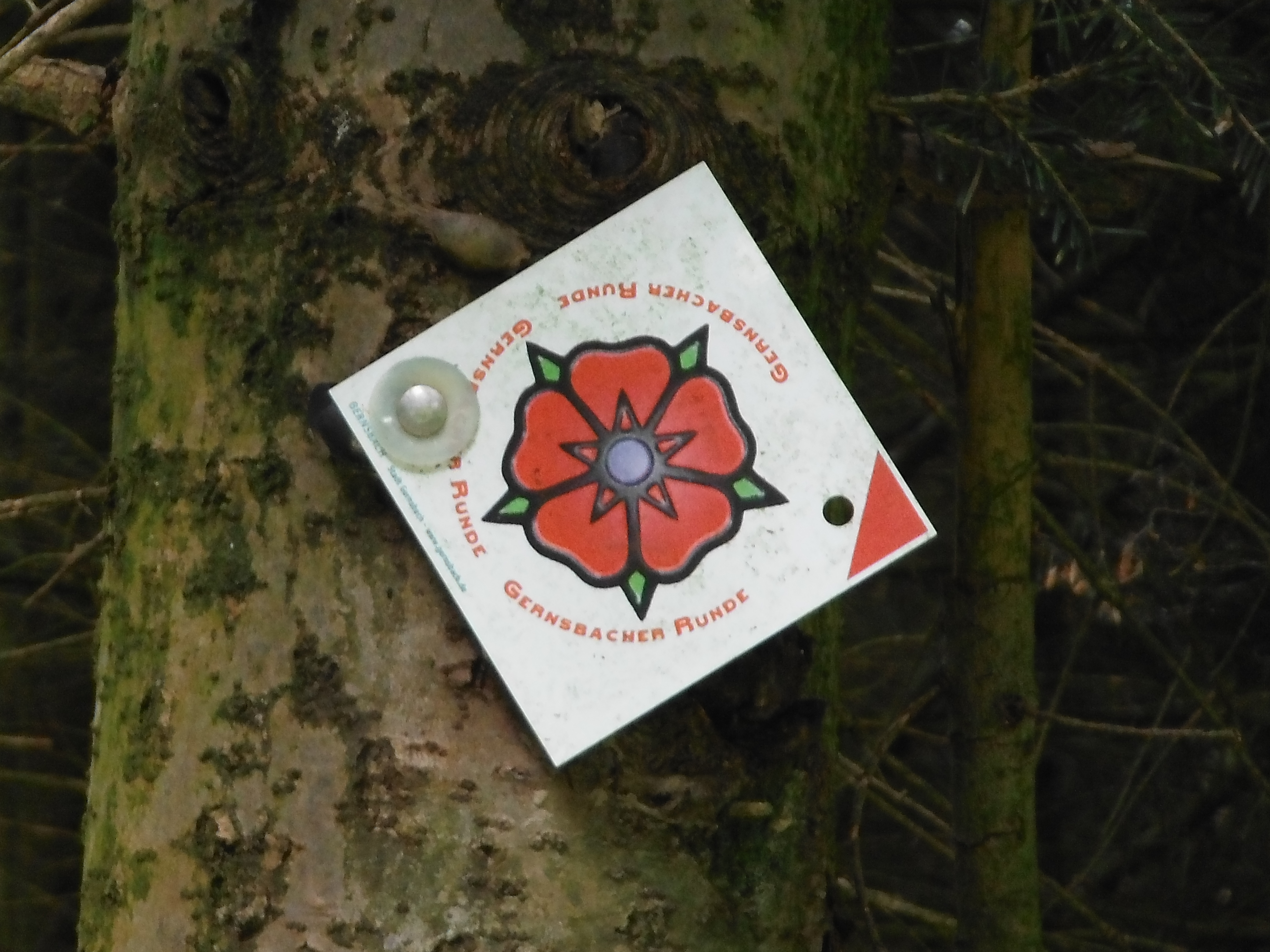 Das Wappensymbol der Grafen von Eberstein leitet den Wanderer auf der Gernsbacher Runde